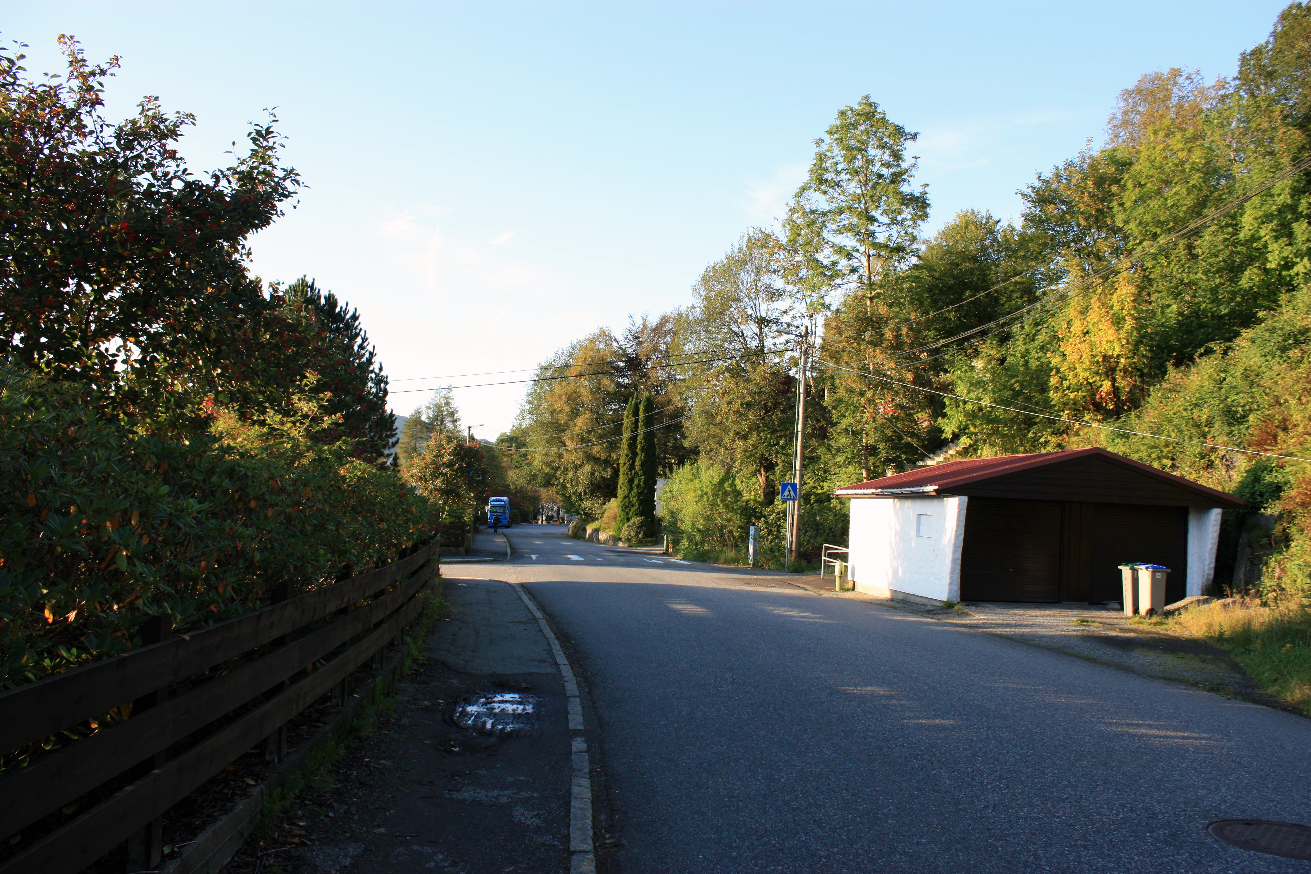 Øvsttunvegen, Fana, Bergen.